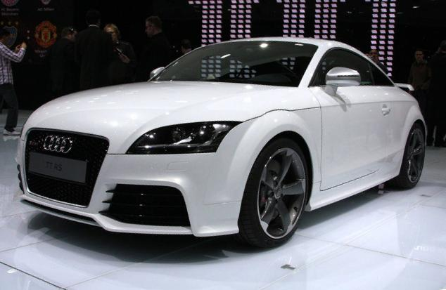 L'Audi TT-RS au Salon de Genève 2009